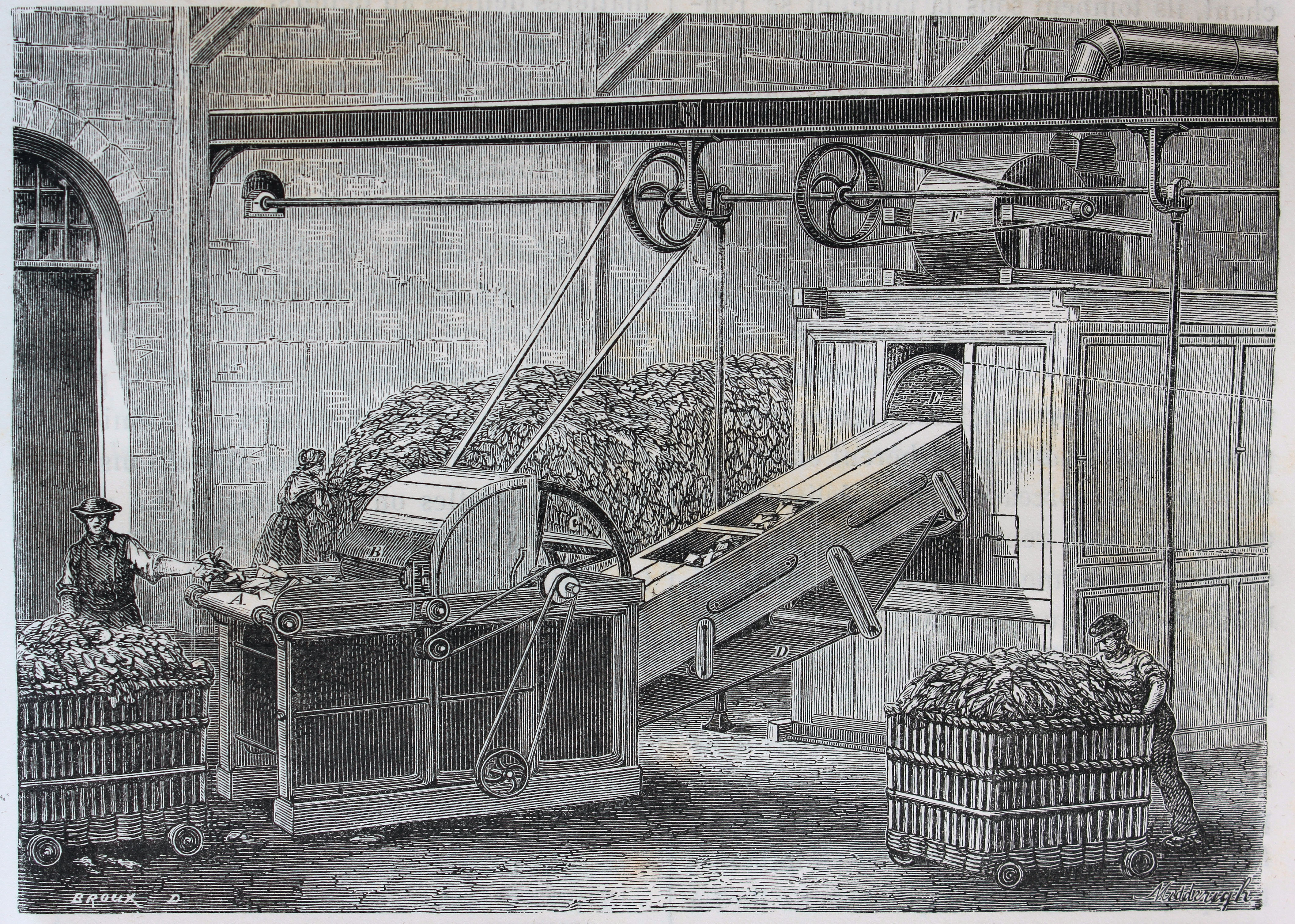 Ilustraciones de la obra : Les merveilles de l'industrie ou, Description des principales industries modernes / par Louis Figuier. - Paris : Furne, Jouvet, [1873-1877]. - Tome II